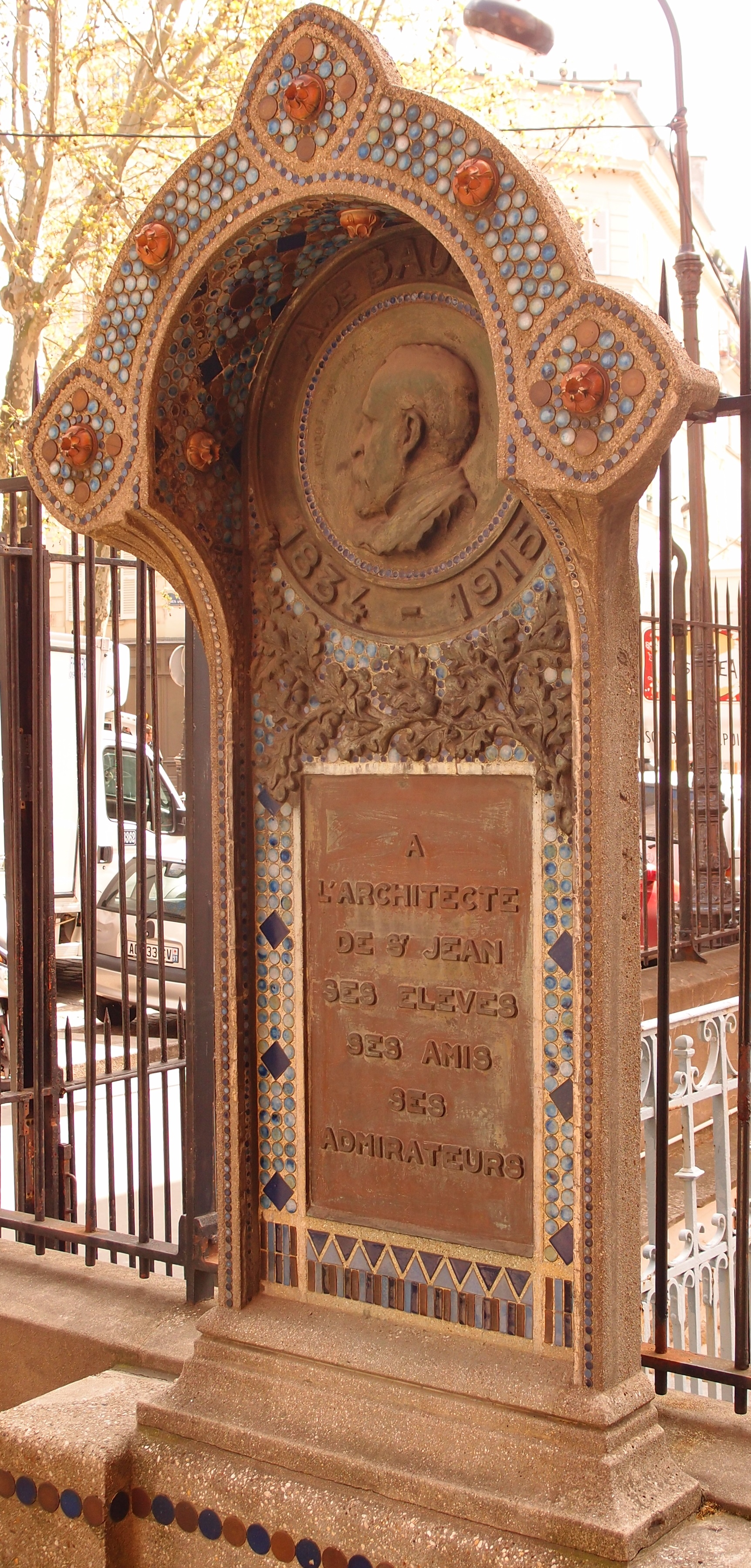 Denkmal für den Architekten Anatole de Baudot (1834-1915) an der Pfarrkirche Saint-Jean de Montmartre in Paris